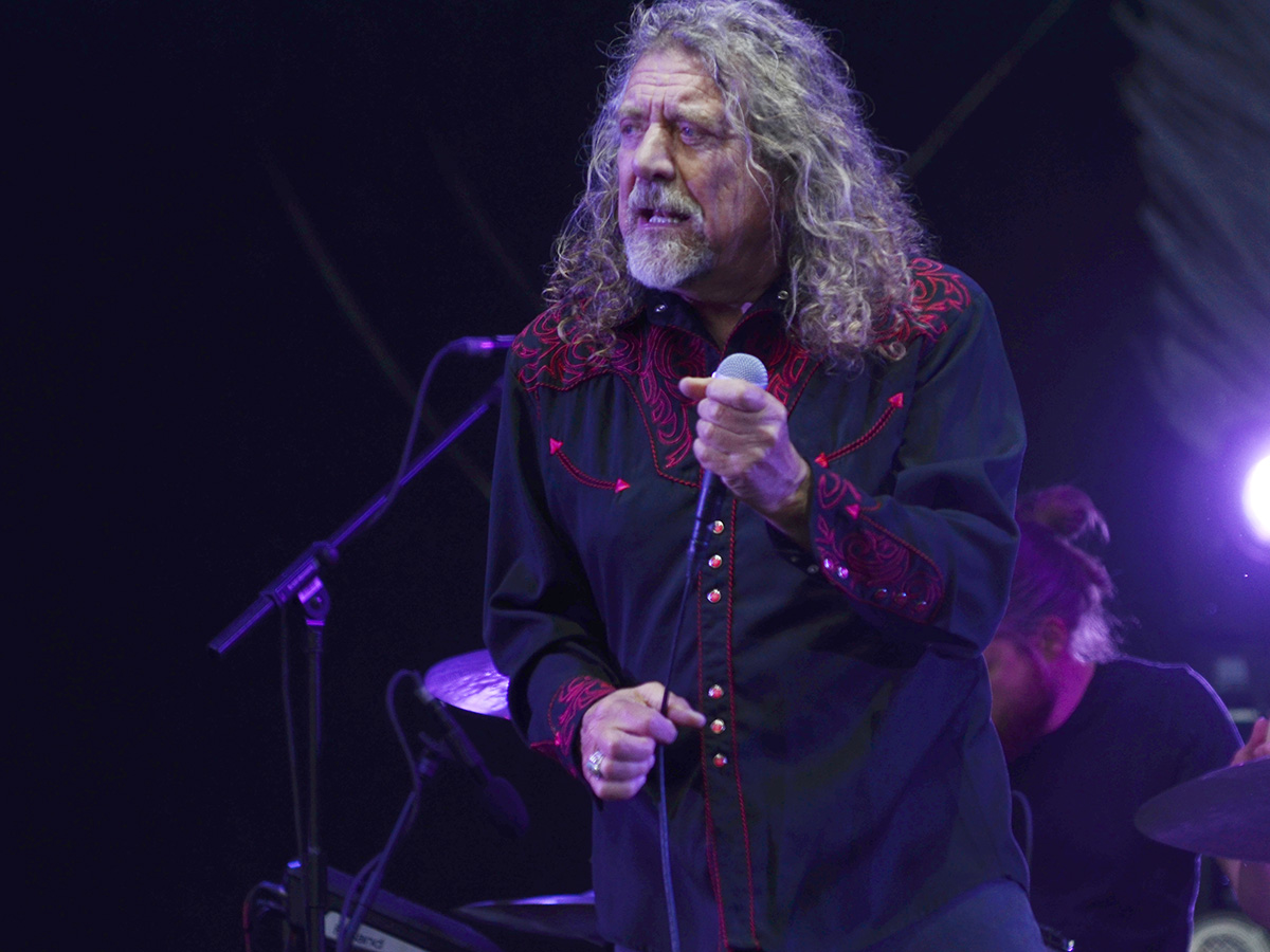 Robert Plant and The Sensational Space Shifters ont livré un set haut en couleurs en 2016.